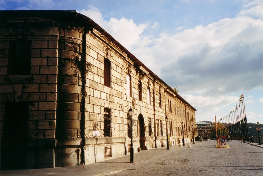 Kriegsministerium in Budapest